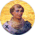 oude gravure Paus Benedictus IX uit de middeleeuwen.